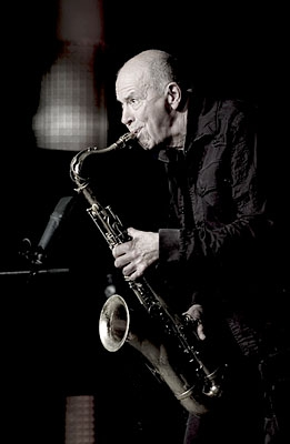 Saxophonist Heinz Sauer, Konzert in Mainz 2008